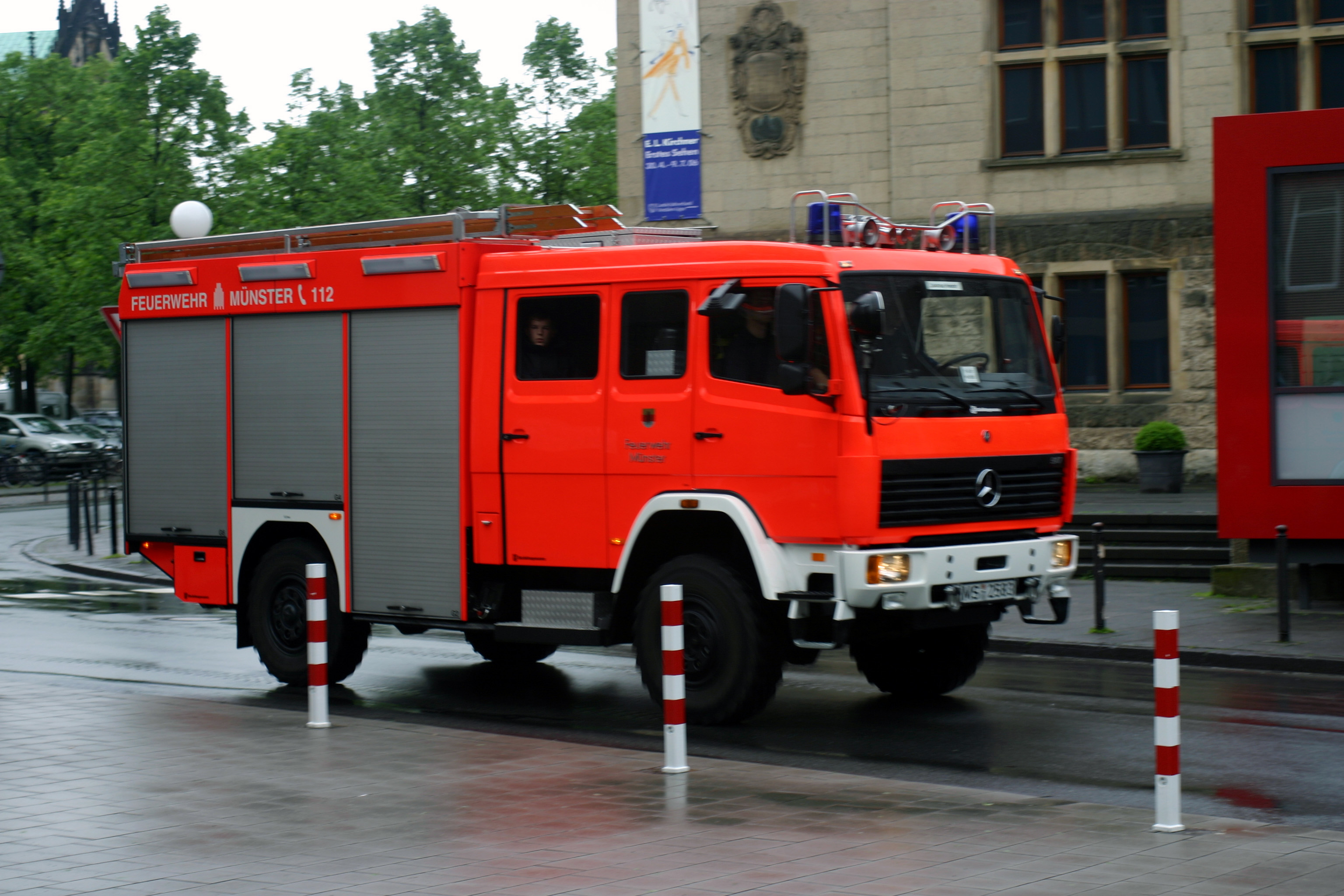 Mercedes Benz Fahrzeug der Feuerwehr in Münster, Typ Löschgruppenfahrzeug 16/12 (LF 16/12)